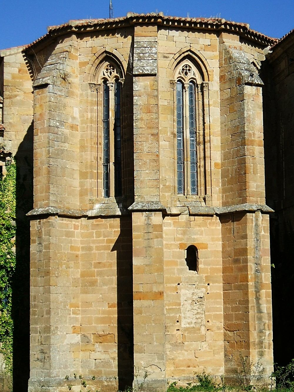 Ábside protogótico (siglos XII a XIII) de la iglesia del Monasterio de Santa María la Real, Aguilar de Campoo, Palencia, España/Spain